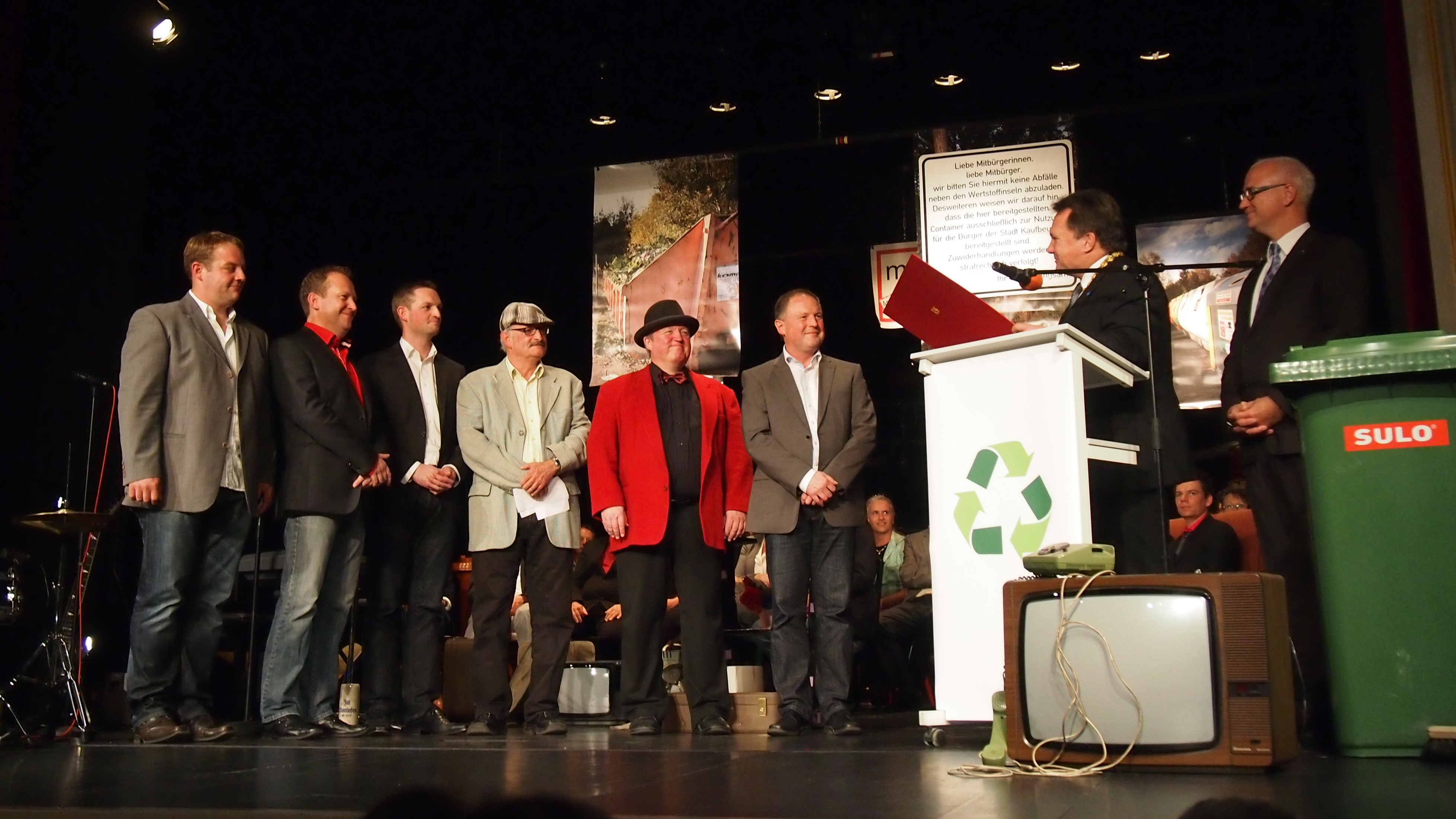 Verleihung des Kulturpreises der Stadt Kaufbeuren 2013 an die Paurische Mundart-Band "Mauke" aus Neugablonz im Stadttheater Kaufbeuren. Links die Band, rechts Oberbürgermeister Stefan Bosse und Laudator Wolfgang Krebs